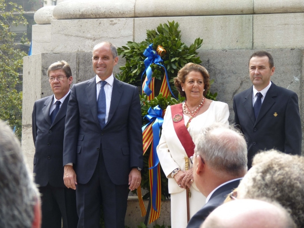 Camps i Rita als actes del 9 d'octubre.